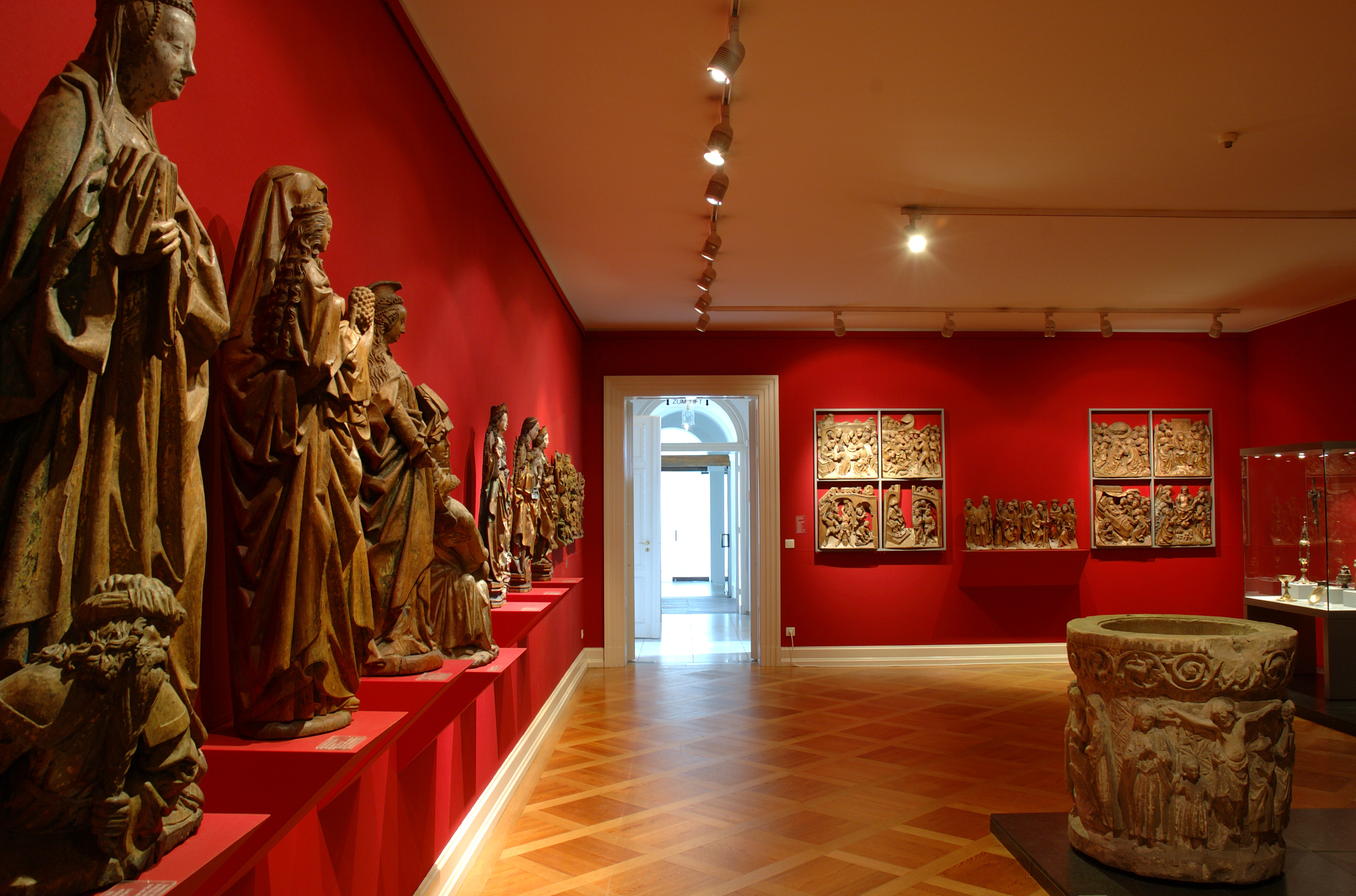 Blick in die Daueraustellung Abt. Kirchenkultur